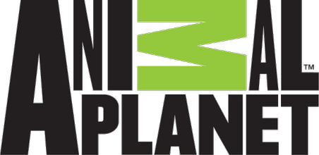 Animal Planet Logo